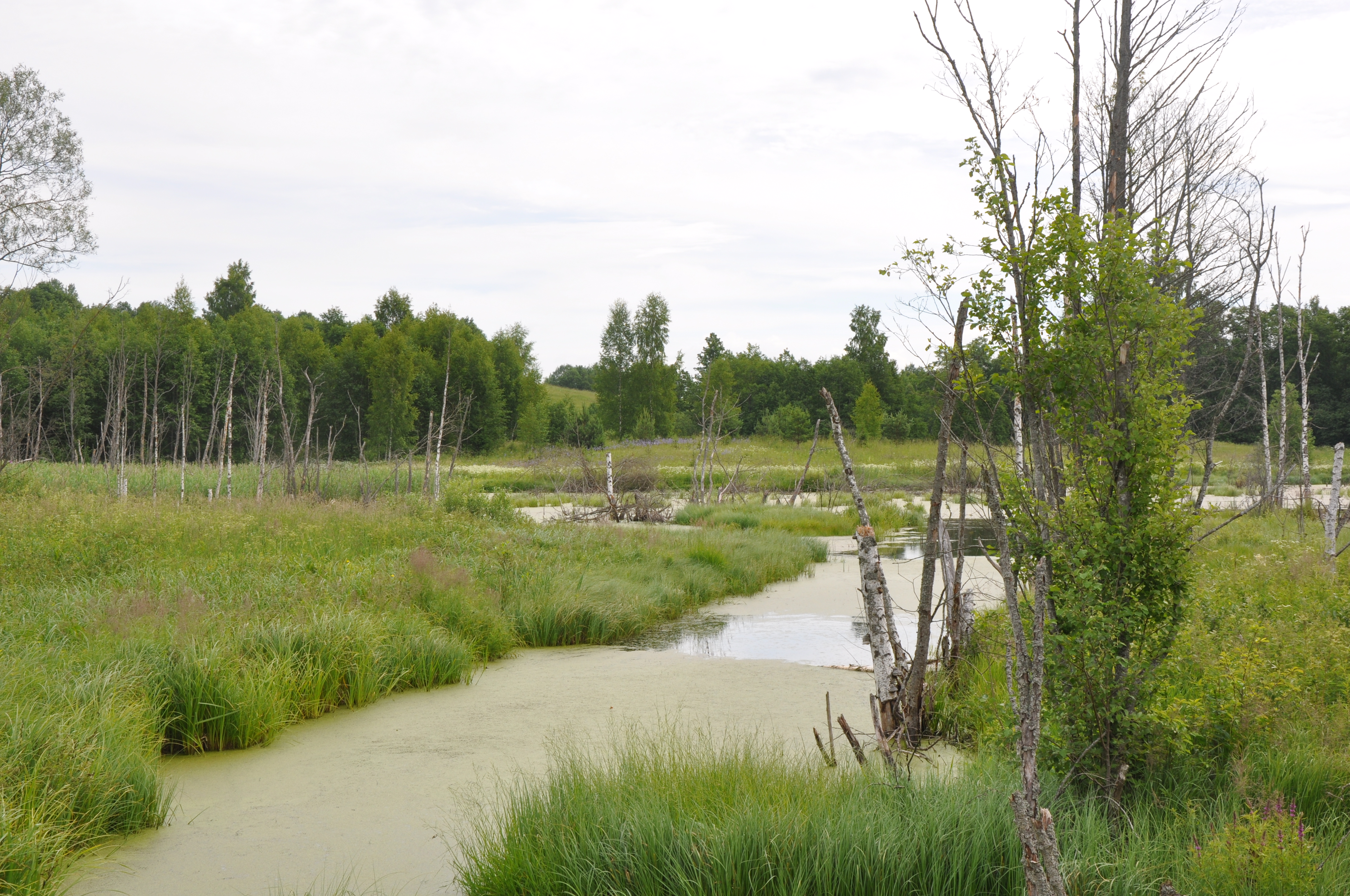 Paulinkas ieteka Stībreitā, Andzeļu pagasts, Dagdas novads, Latvia